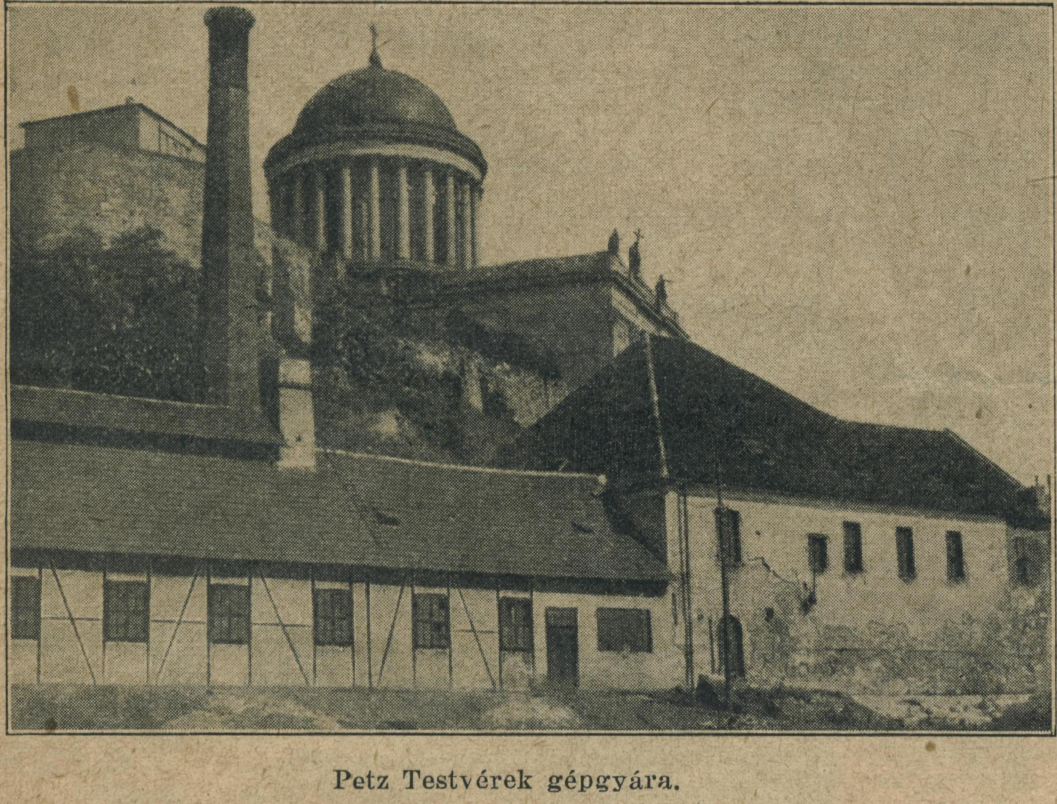 Petz-gyár a Vízivárosban